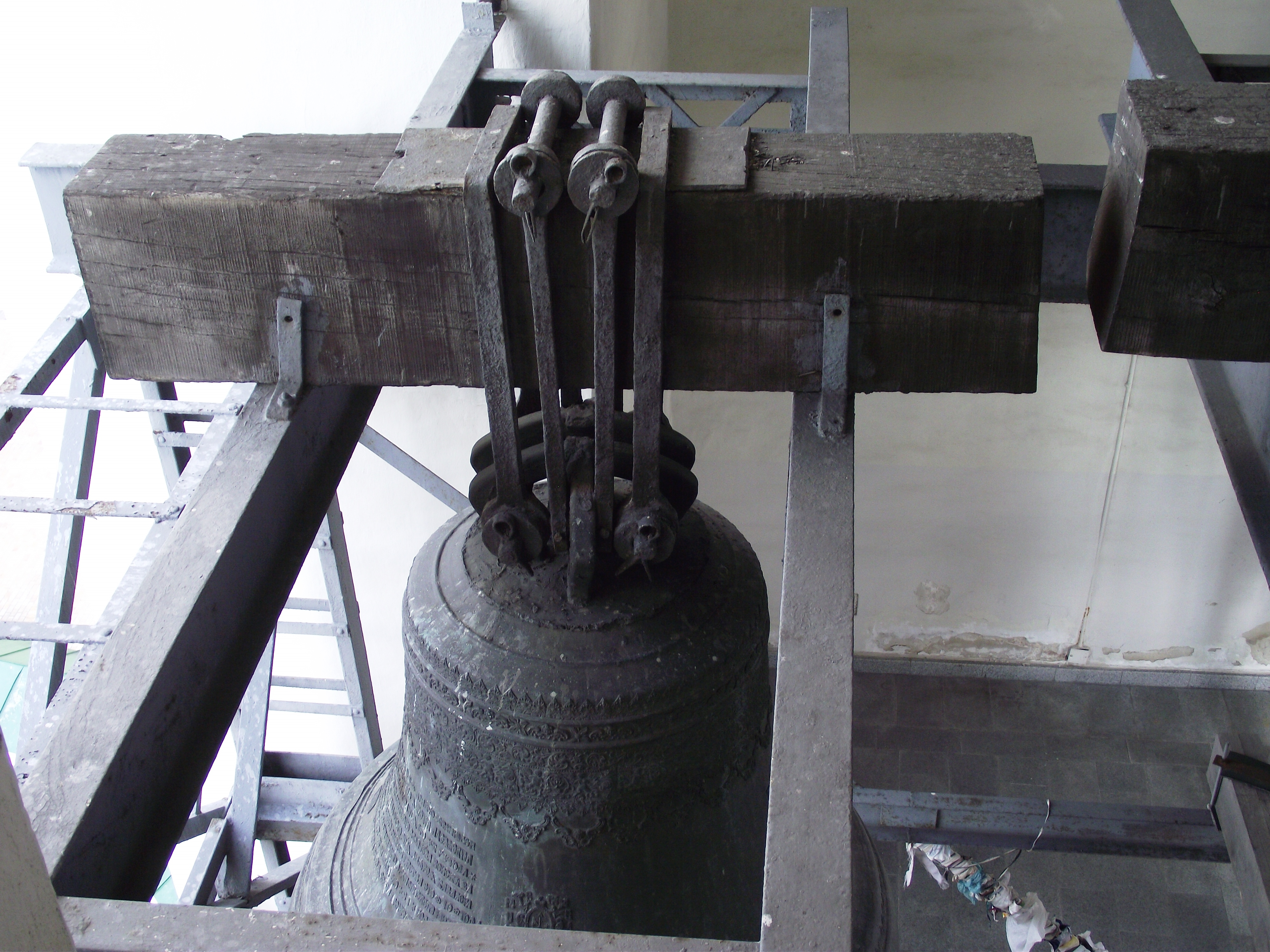 кін. ХVІІ ст., 1744–1748 (відбудова), 1851–1852 (реконструкція), 1953, 1972 (реконструкція) Дзвони.